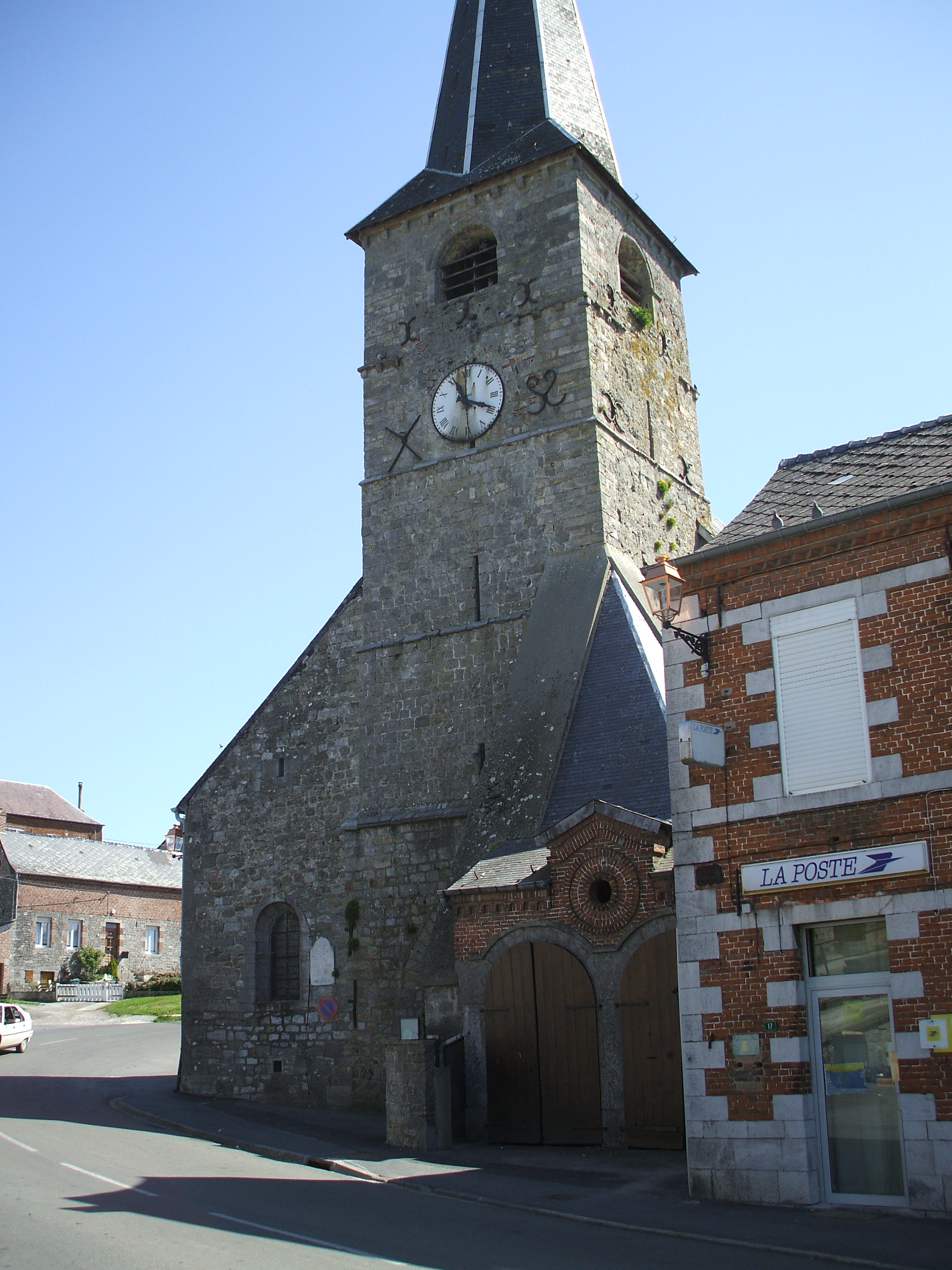 église de Dompierre-sur-Helpe Nord france